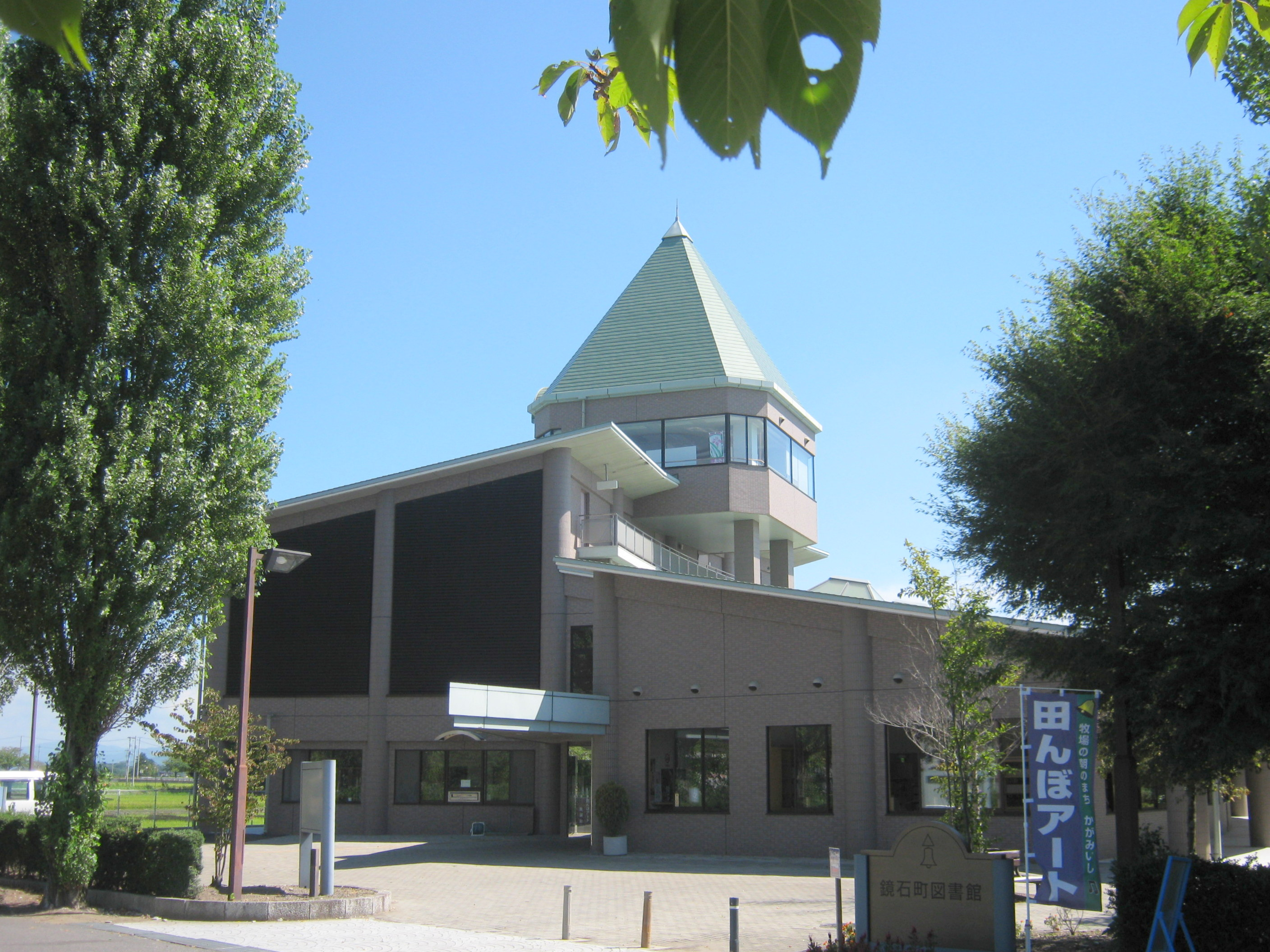 福島県の鏡石町図書館。